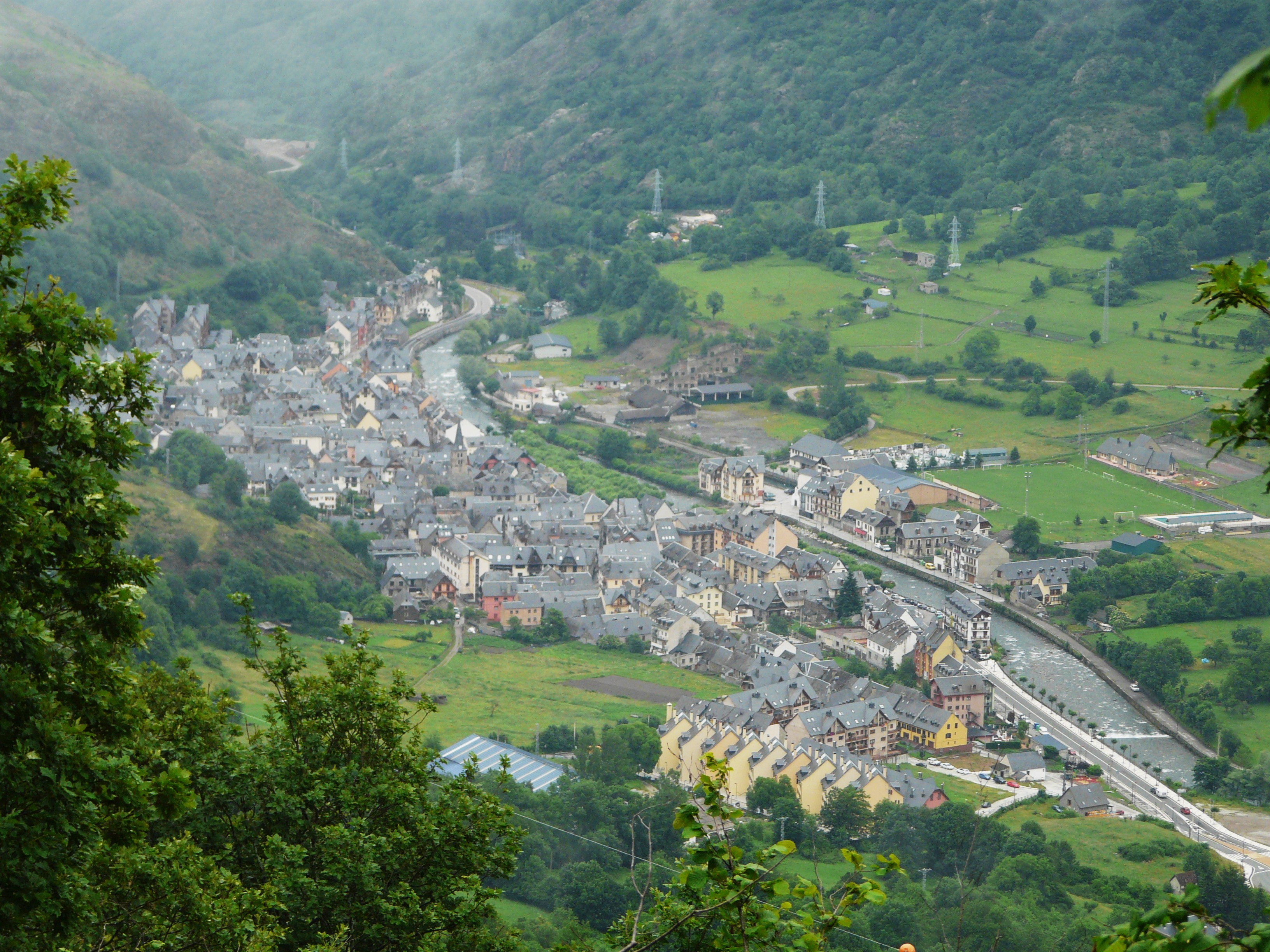 Le village de Bossòst traversé par la Garonne, Val d'Aran, Catalogne, Espagne.